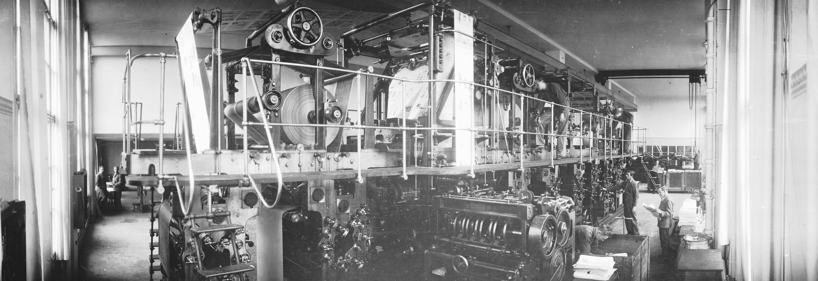 Vårt Hems tryckeri, vid Götgatan / Ringvägen